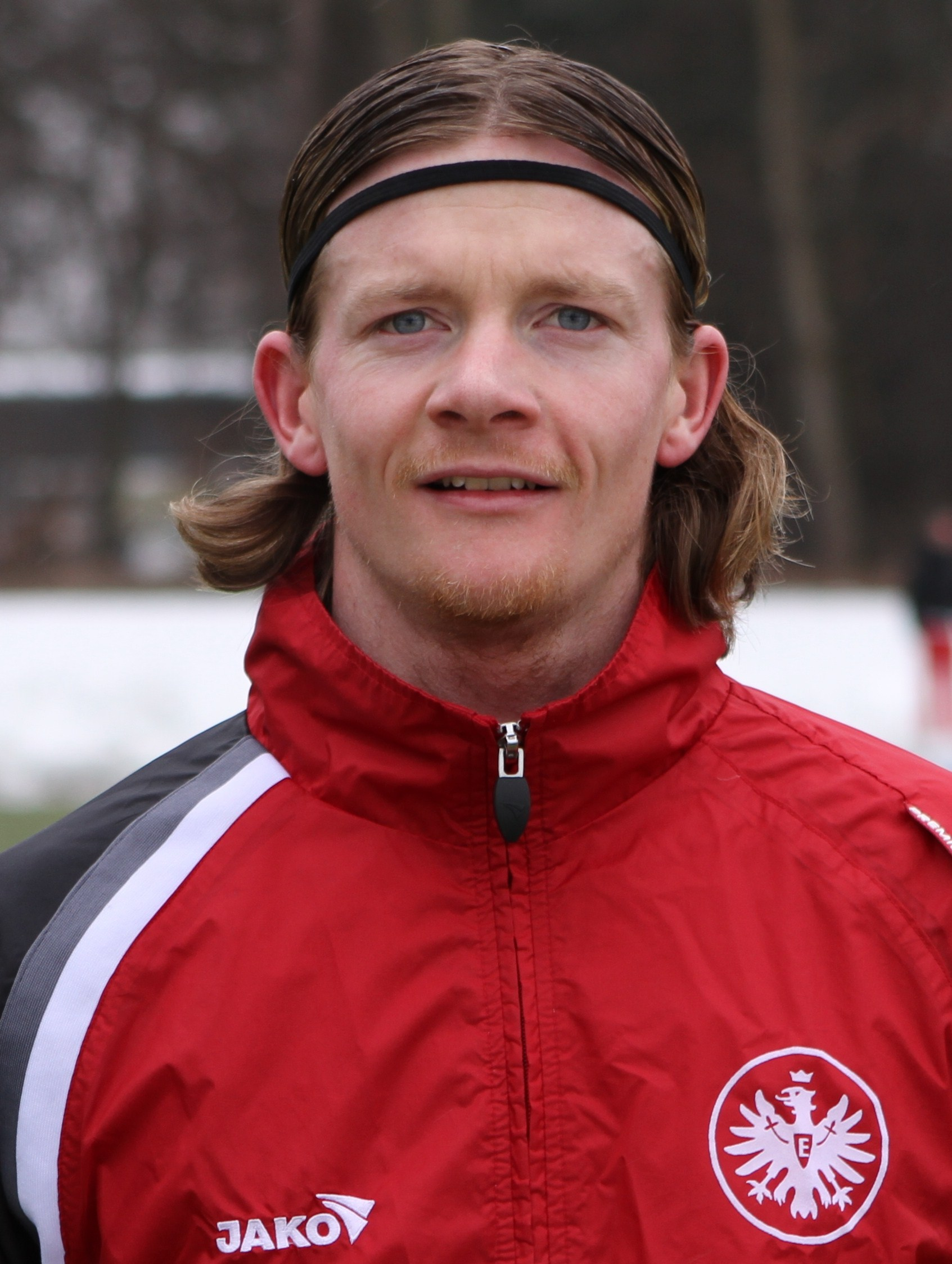 Sascha Boller bei Eintracht Frankfurt 2010